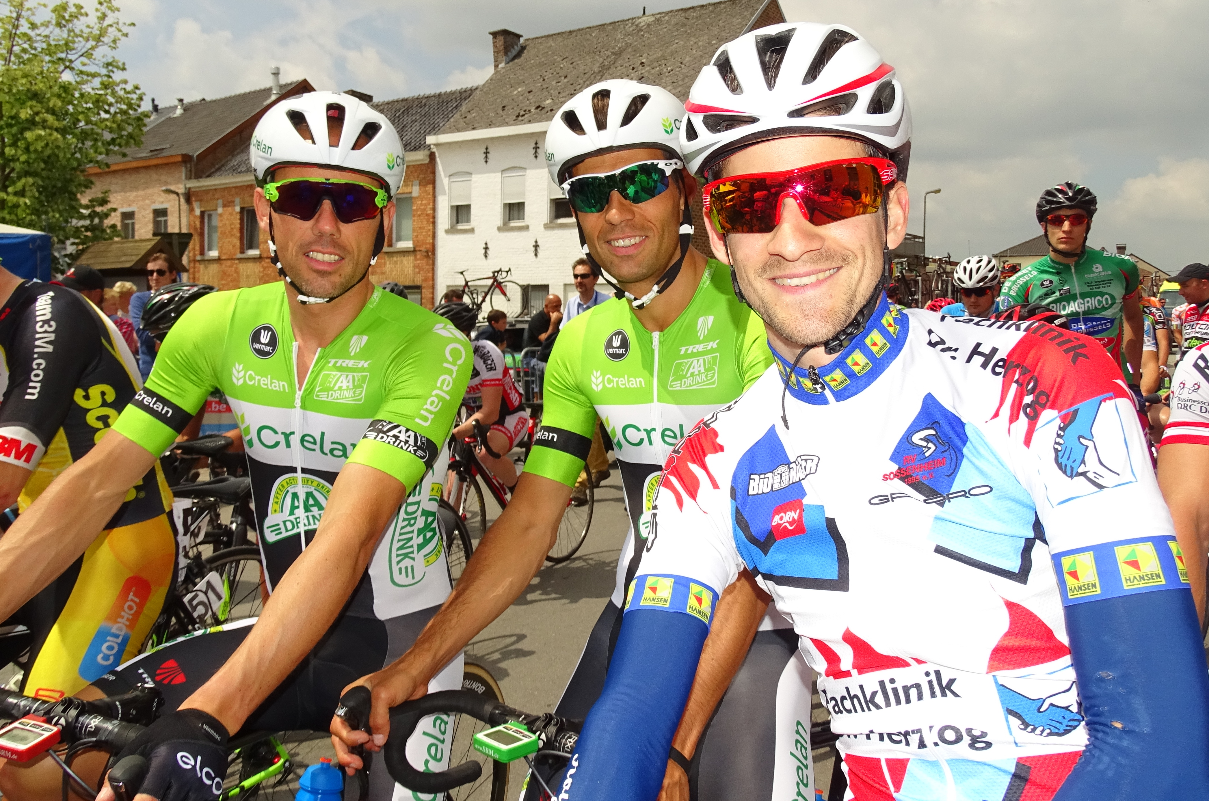 Reportage réalisé le mercredi 24 juin à l'occasion du départ et de l'arrivée de l'Internationale Wielertrofee Jong Maar Moedig 2015 à Oetingen (Gooik), Belgique.